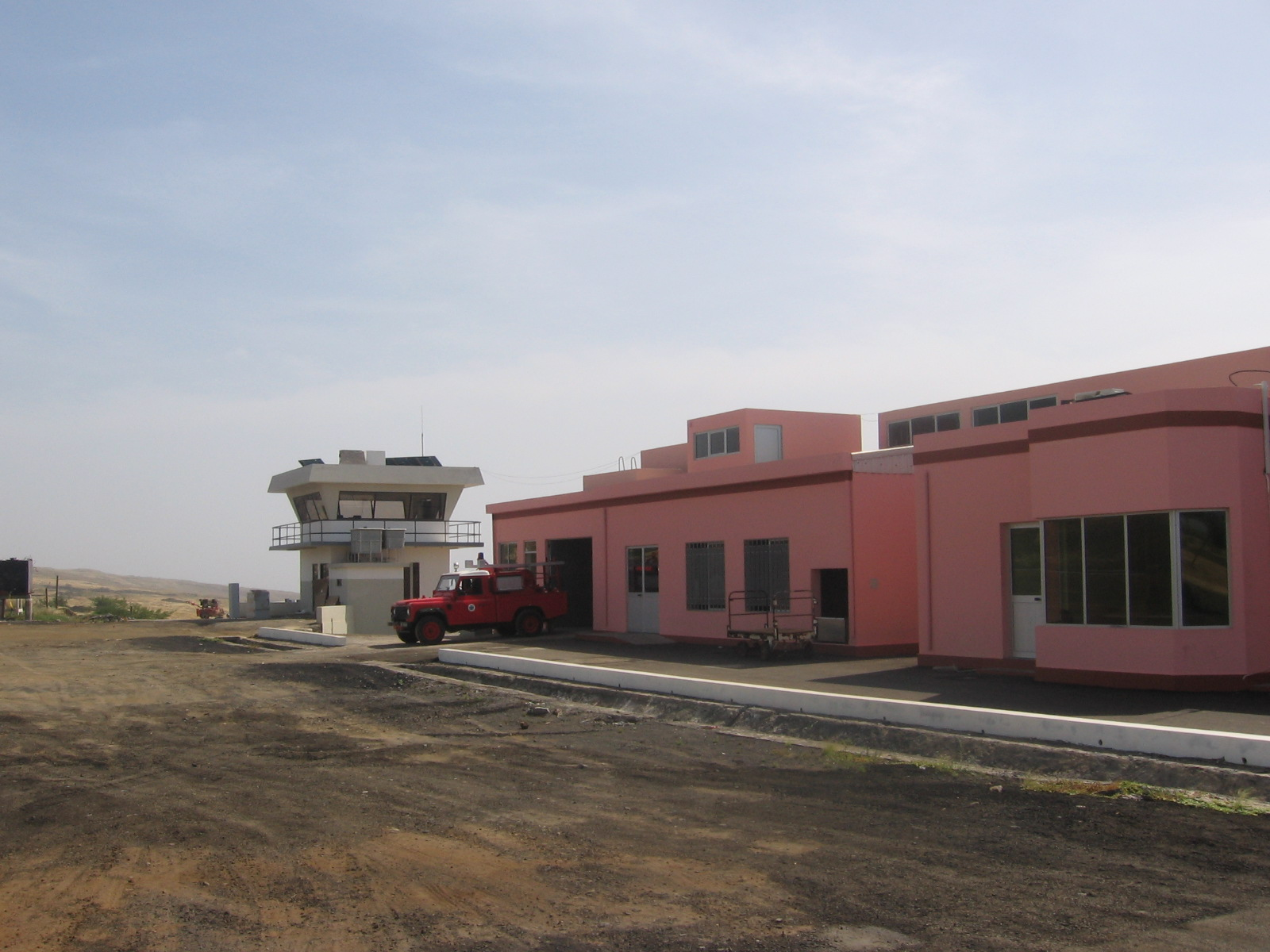 Edifícios do Aeródromo de São Filipe, ilha do Fogo, Cabo Verde